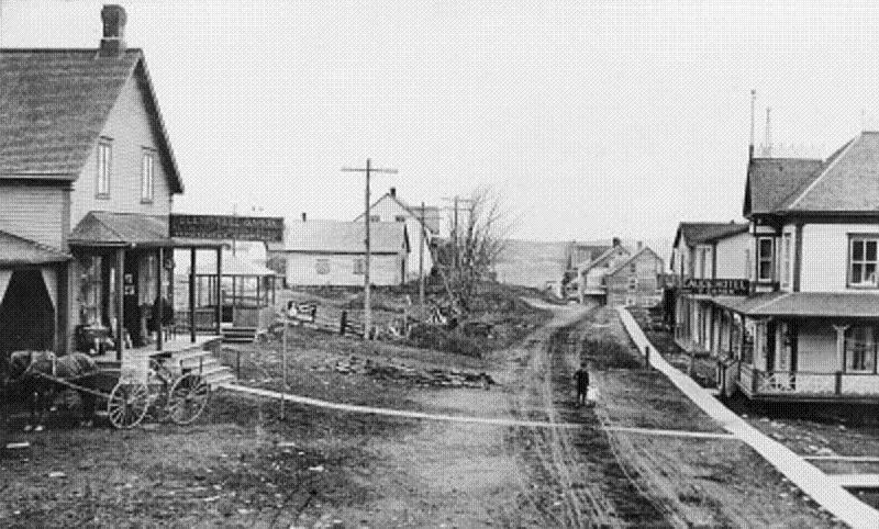 Village du canton d'Aylmer (aujourd'hui Saint-Sébastien) en 1910